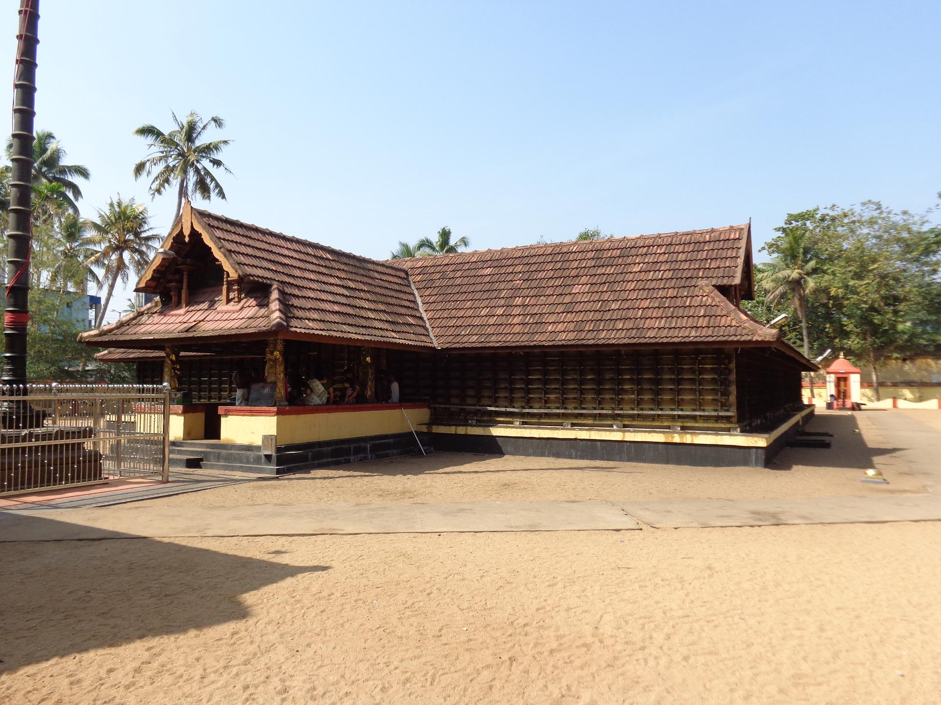 നങ്ങ്യാർകുളങ്ങര ശ്രീകൃഷ്ണസ്വാമിക്ഷേത്രം വീക്ഷണം